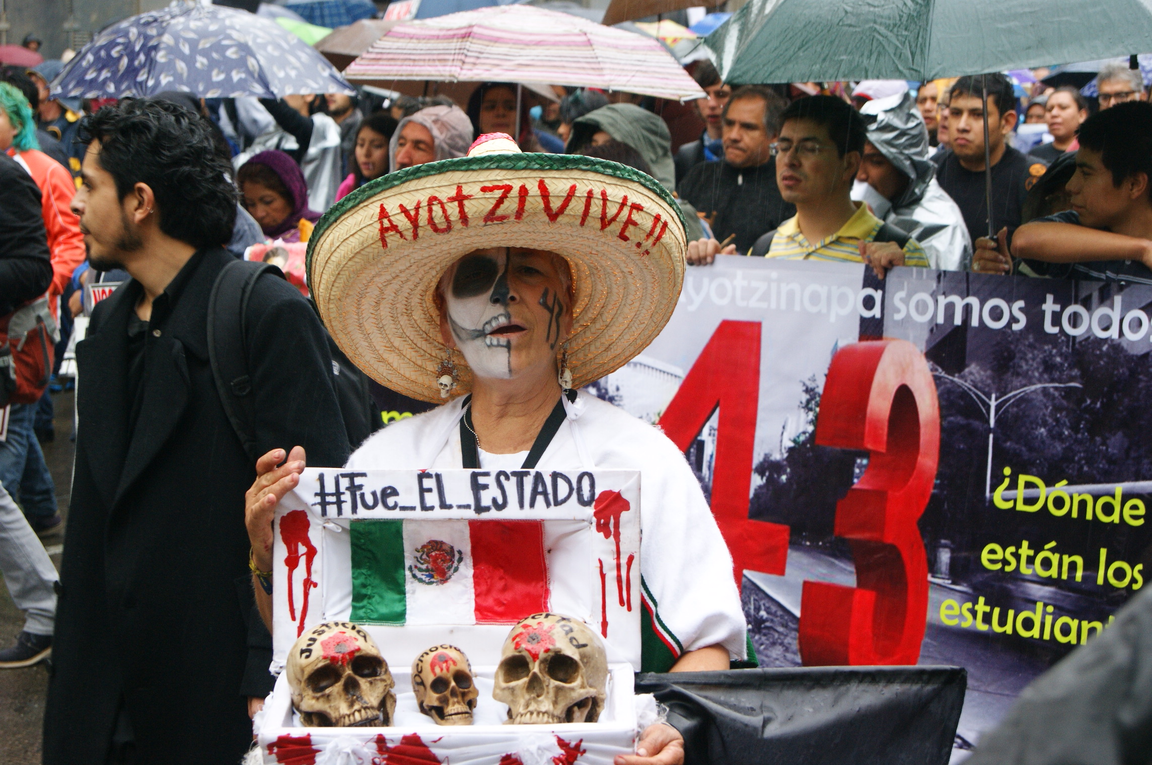 Marcha en el primer aniversario de la desaparición forzada de 43 normalistas de Ayotzinapa